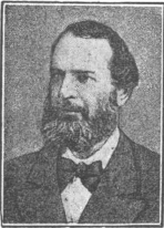 композитор